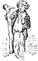 Gepeto Ilustración original de Enrico Mazzanti para la edición de 1883 de Storia di un burattino.